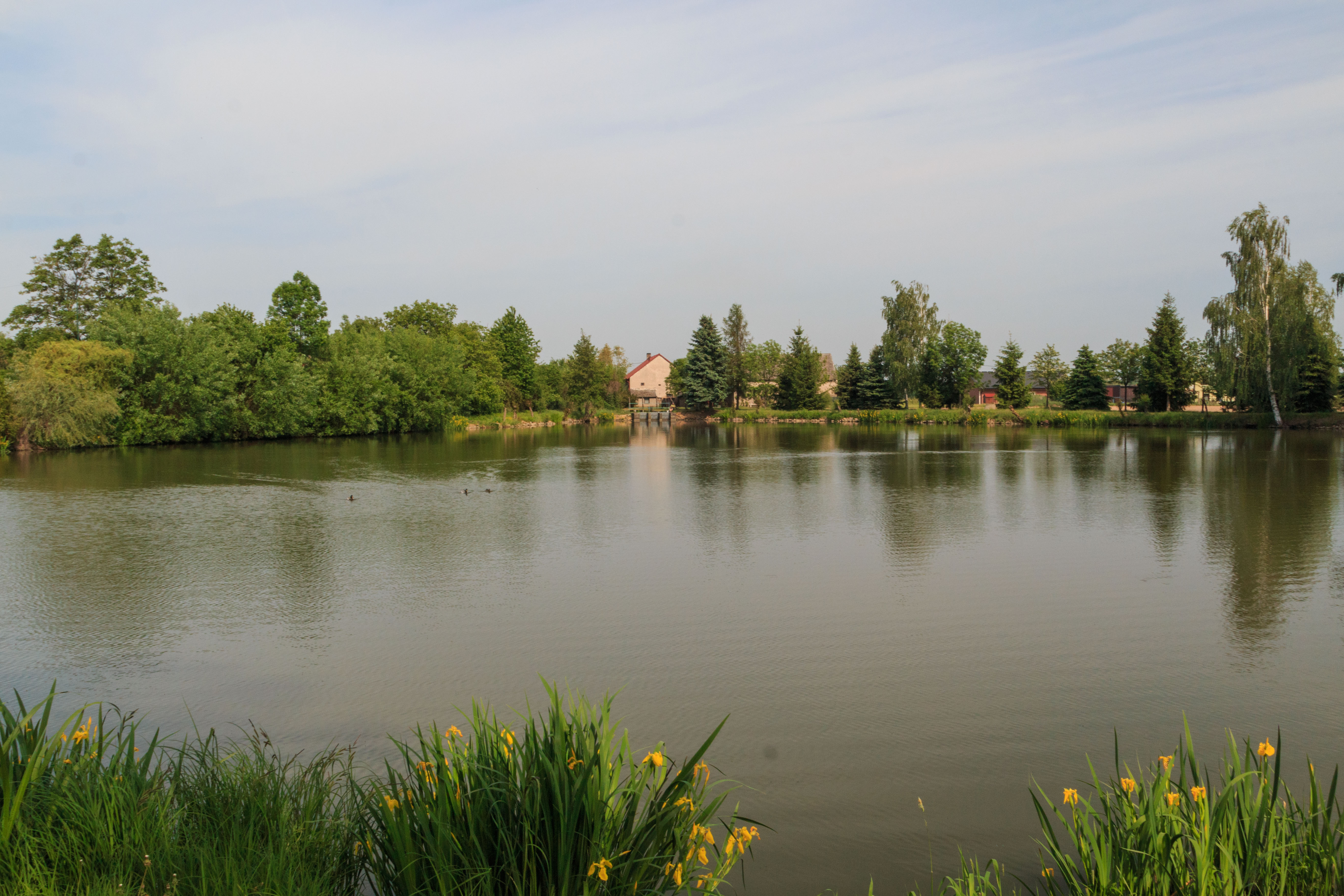 Rybník v Trnávce Project: Vodstvo.